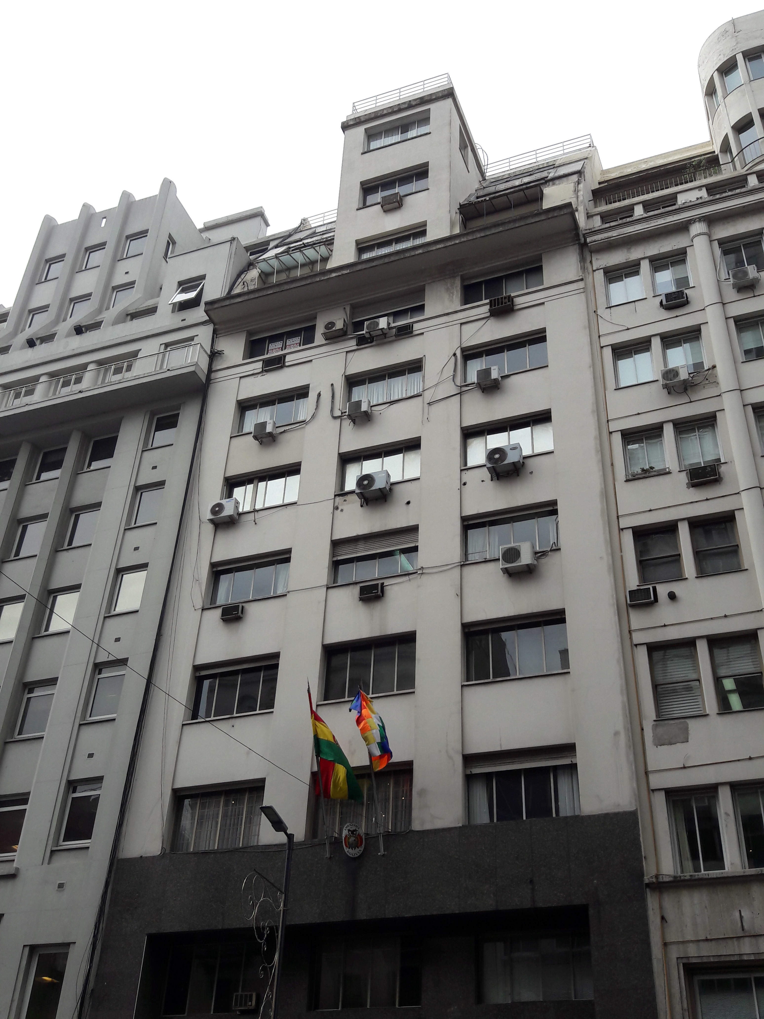 Embajada del Estado Plurinacional de Bolivia, San Nicolás, Buenos Aires, Argentina.